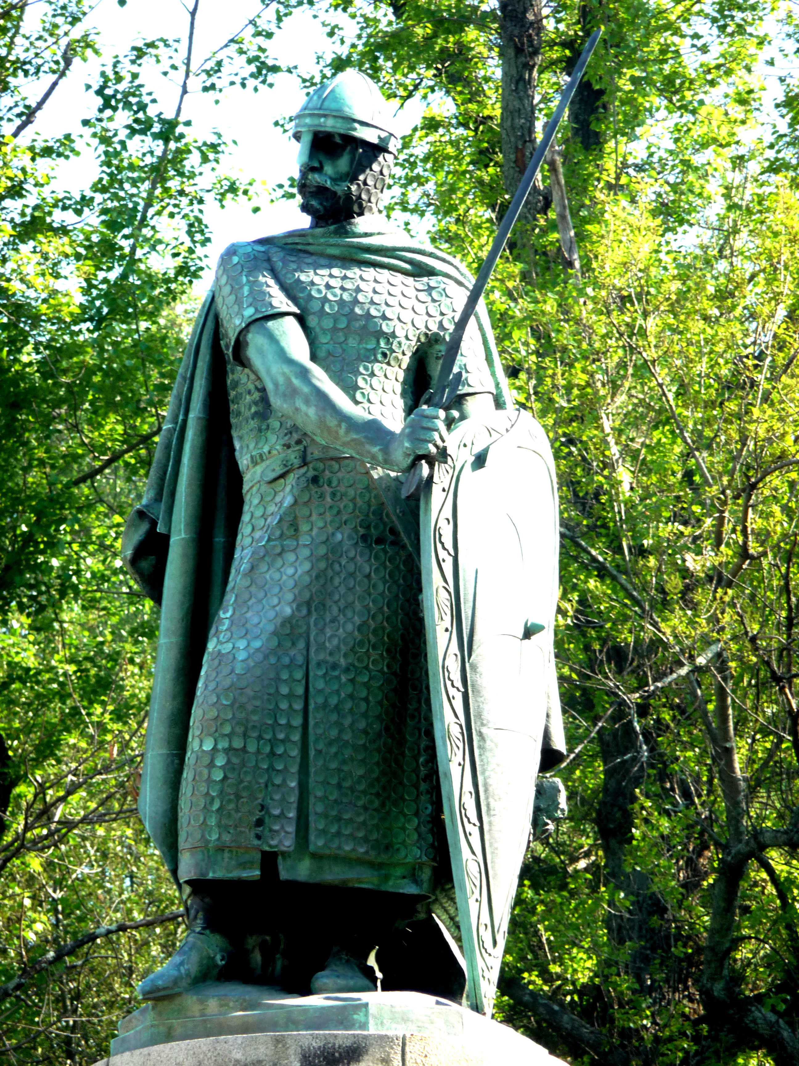 Dom Afonso Henriques, Centro Histórico de Guimarães